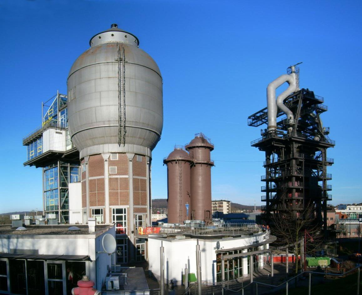 Wasserturm (links) und Hochofen 2 (rechts) in Neunkirchen (Saar)